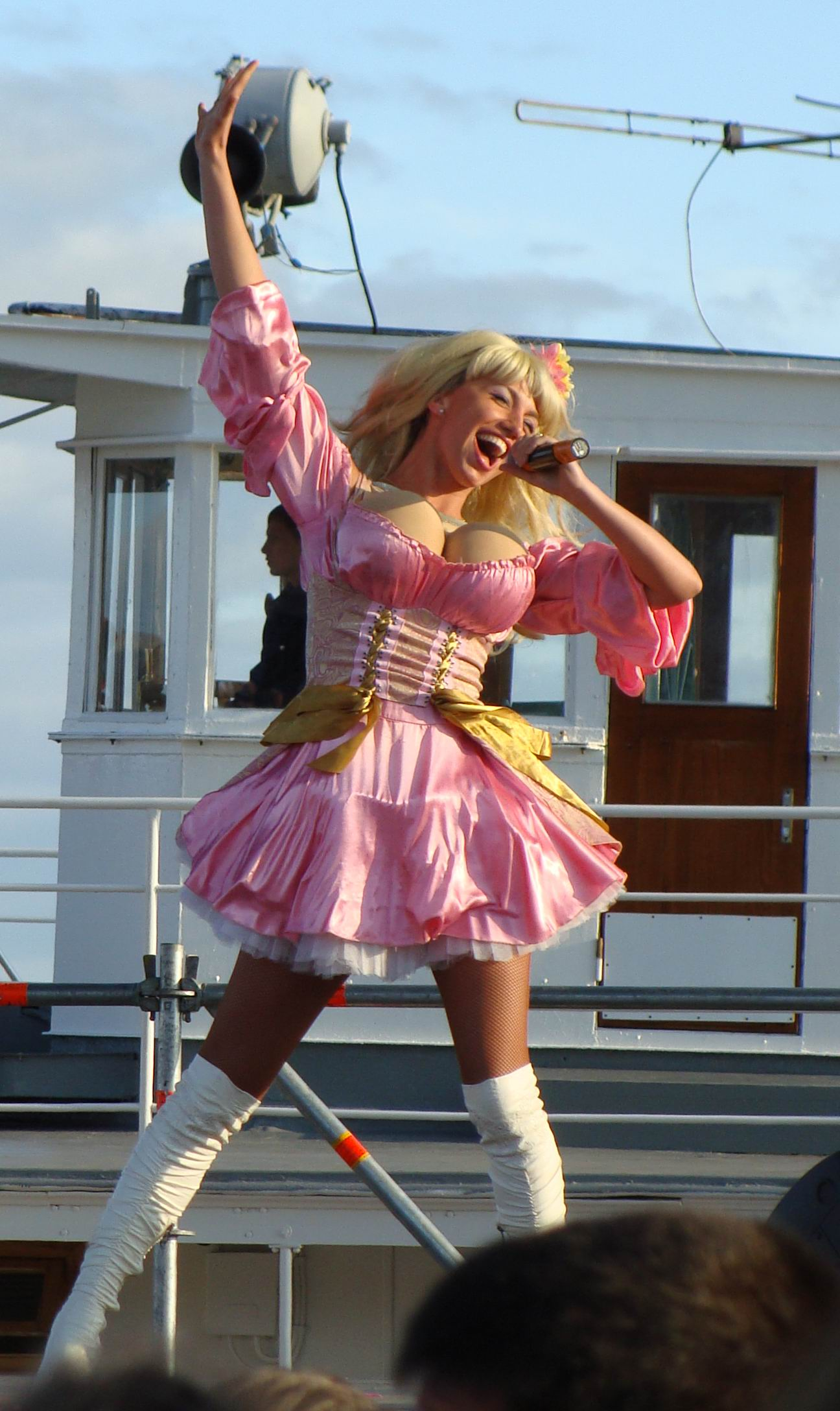 Пародия на Распутину